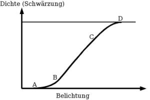 Schematische Darstellung einer Dichtekurve (Fotografie).